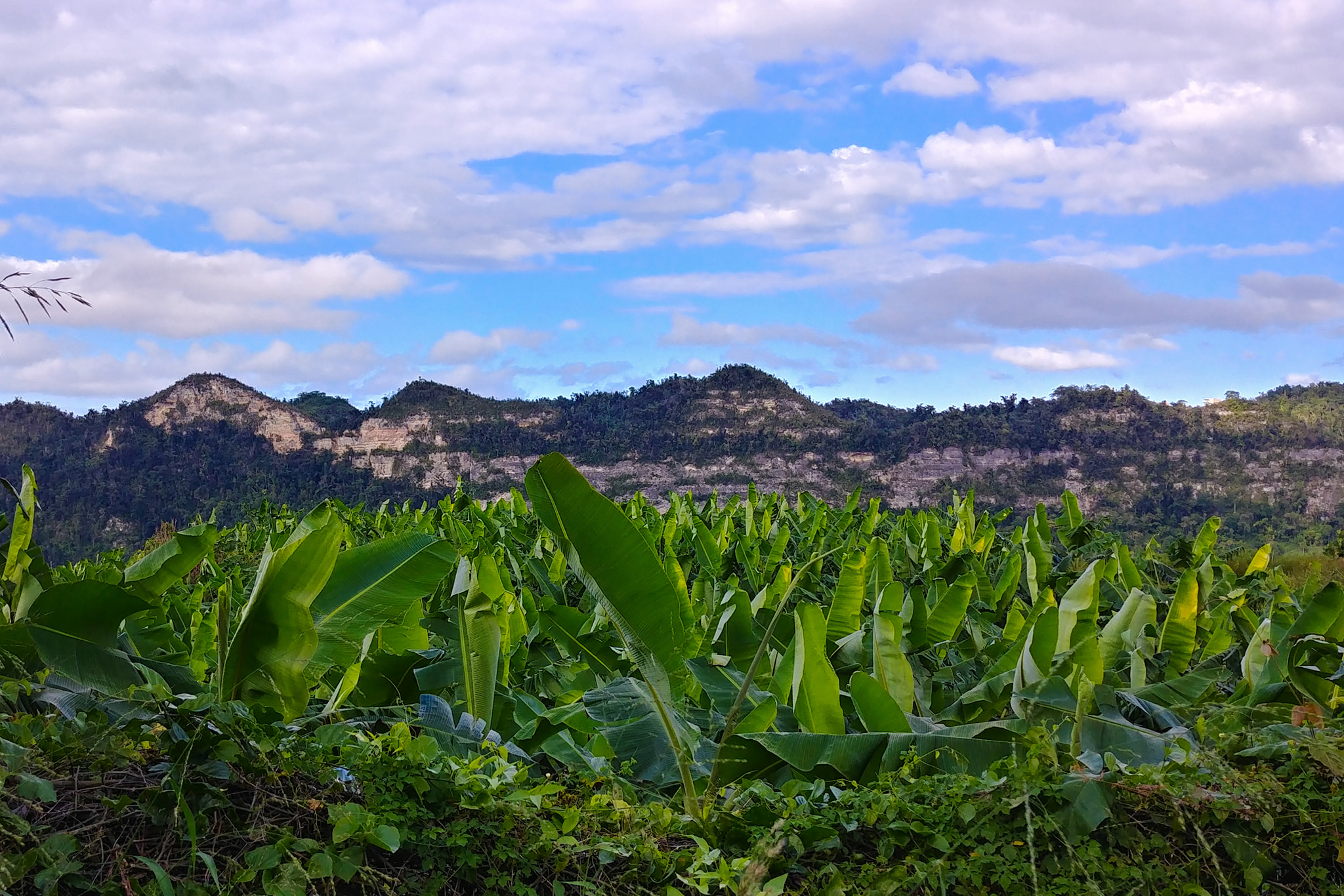 Barrio Cibuco, Corozal, Puerto Rico (2020)